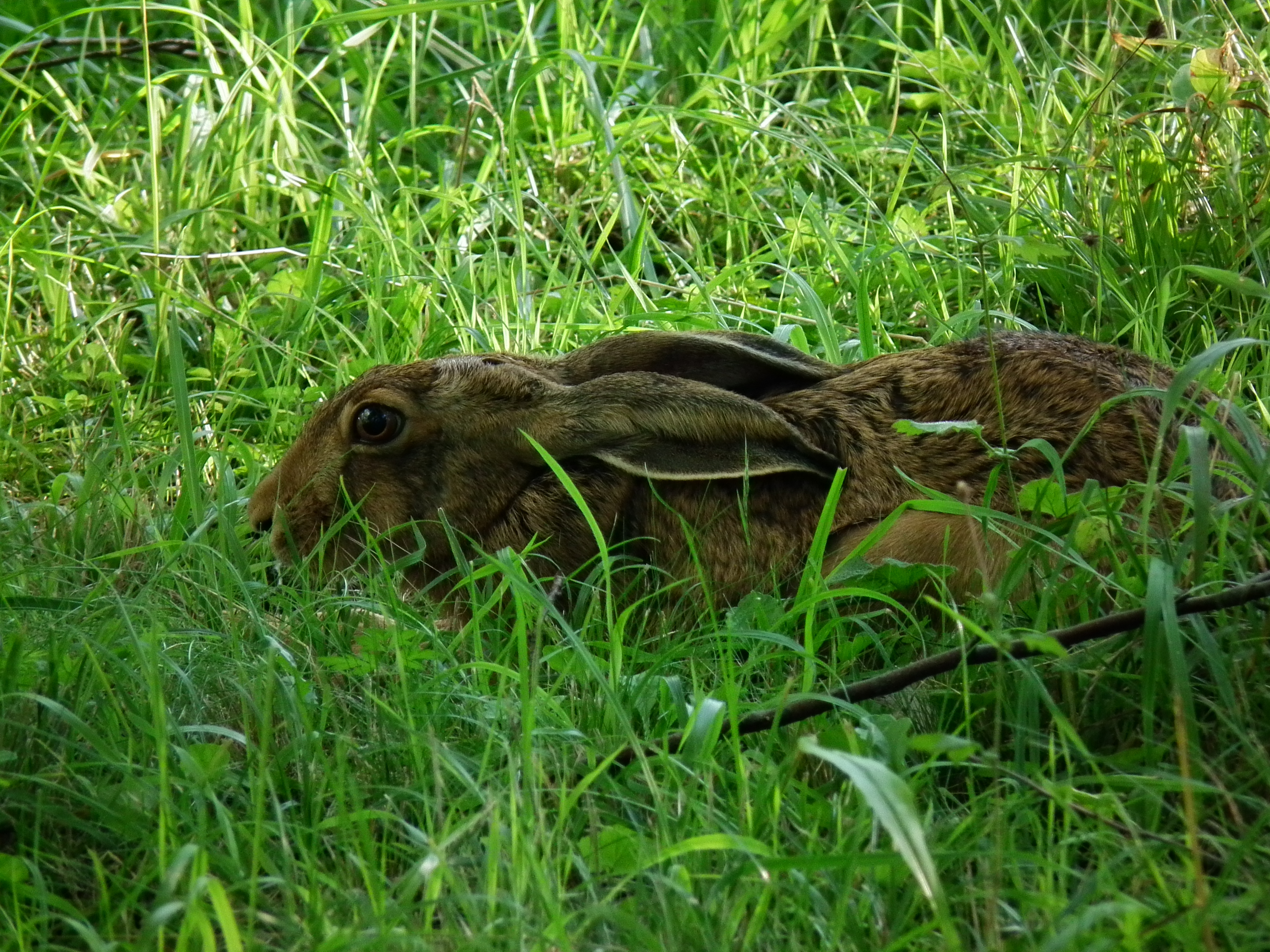 Kauerstellung eines Feldhasen (Lepus europaeus) auf dem Gelände des Botanischen Gartens in Heidelberg (Baden-Württemberg, Deutschland)